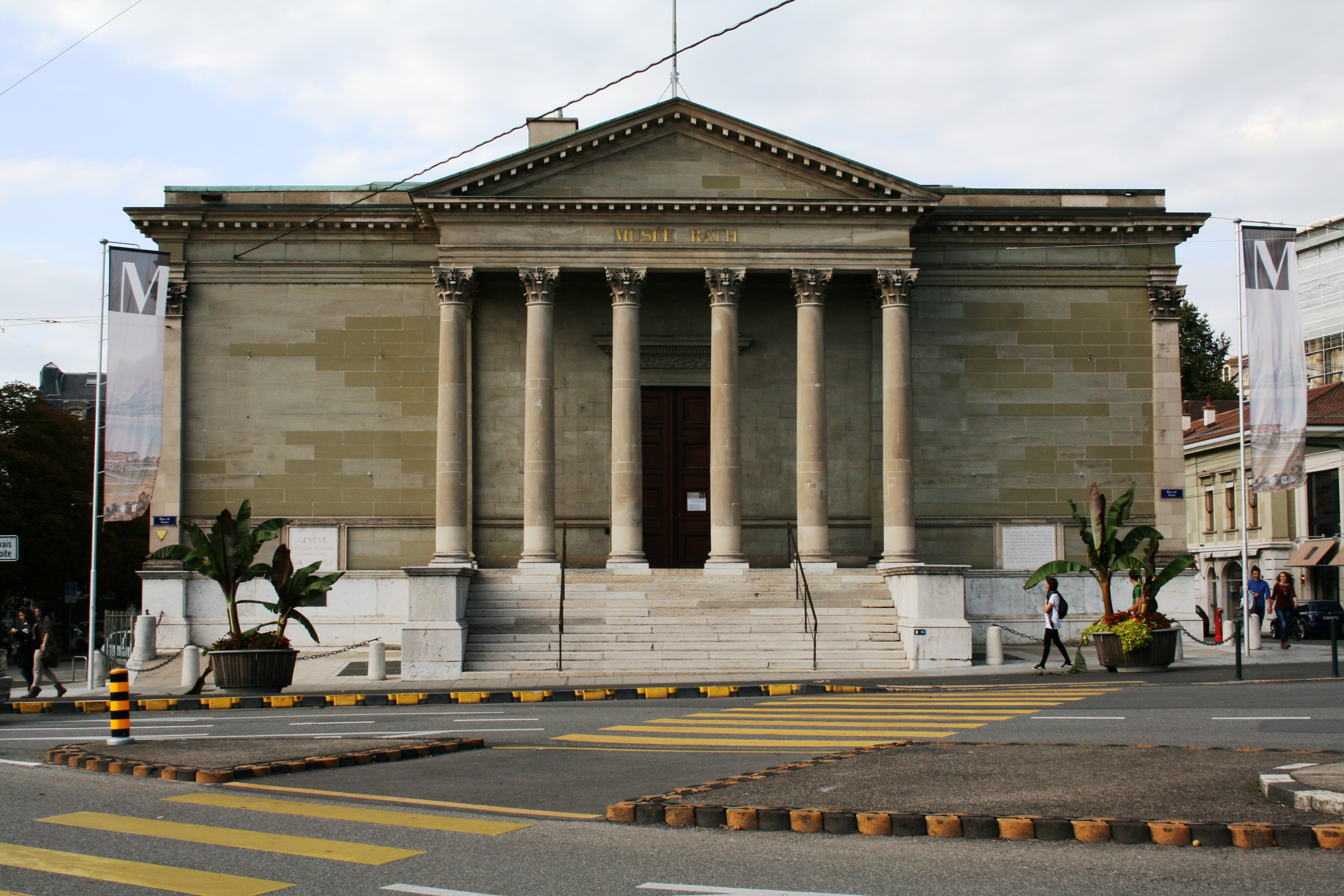 Vue de la façade principale du Musée Rath de Genève depuis la place Neuve.